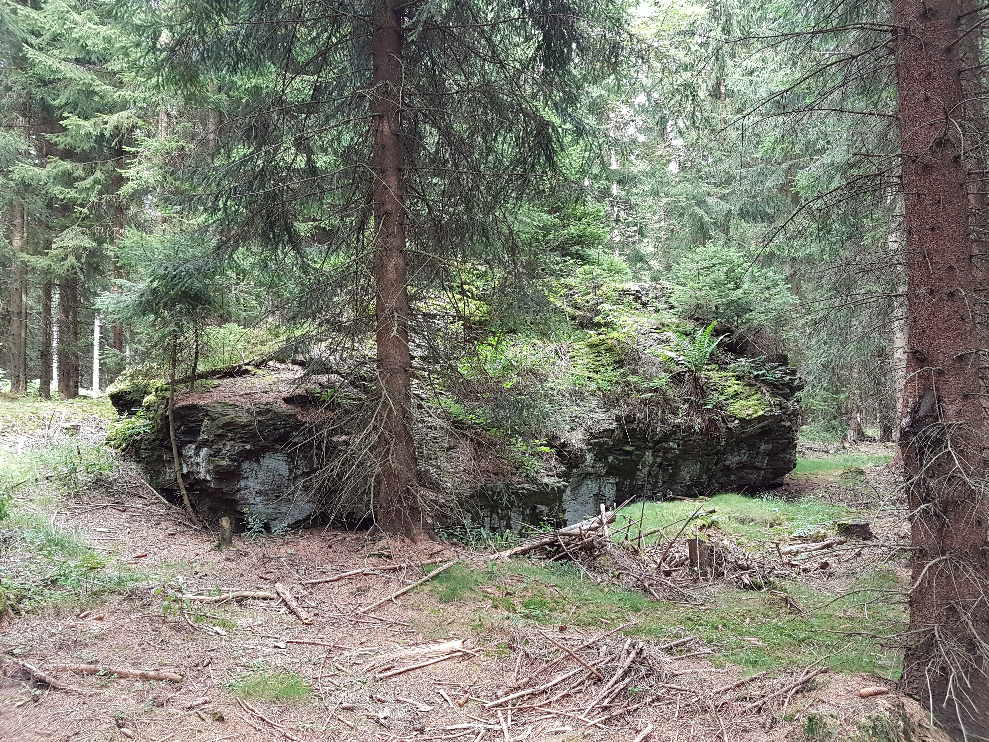 Den höchsten Punkt des Rabenbergs bildet ein Felsen, auf dem sich ein Vermessungspunkt befindet.